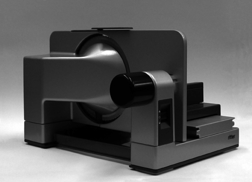 Der Allesschneider der Firma ritterwerk stammt aus dem Jahr 1984. Produktdesigner: Prof. Karl Dittert